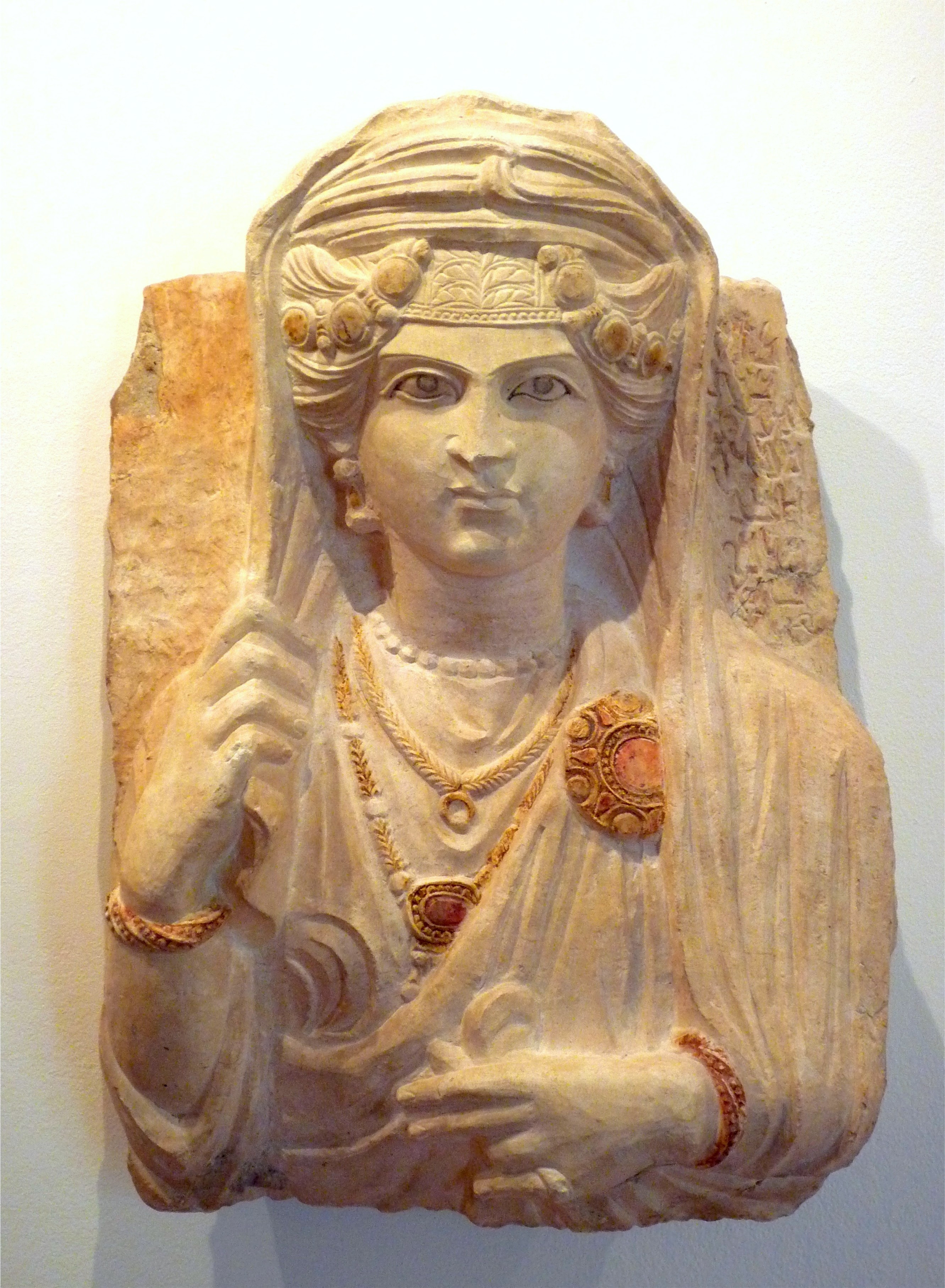 Relief funéraire, buste de femme, Palmyre (Syrie), fin du IIe siècle-début du IIIe siècle, calcaire. Inscription en araméen: Bat'â fille de Moqîm. Don du général Léon de Beylié en 1907 au Musée de Grenoble.